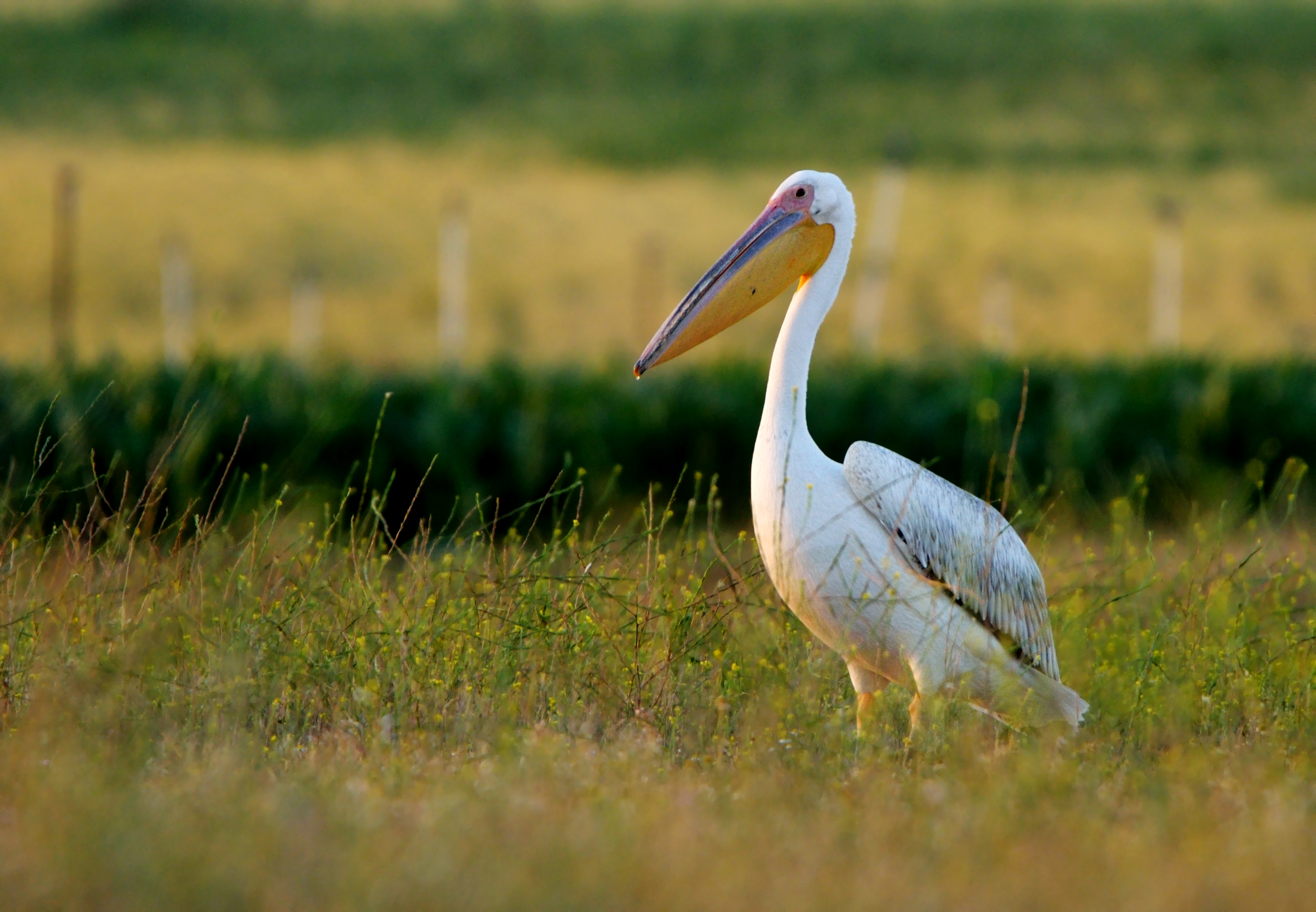 Kurdî: Li Bismilê hatiye dîtin û wêne hatiye girtin